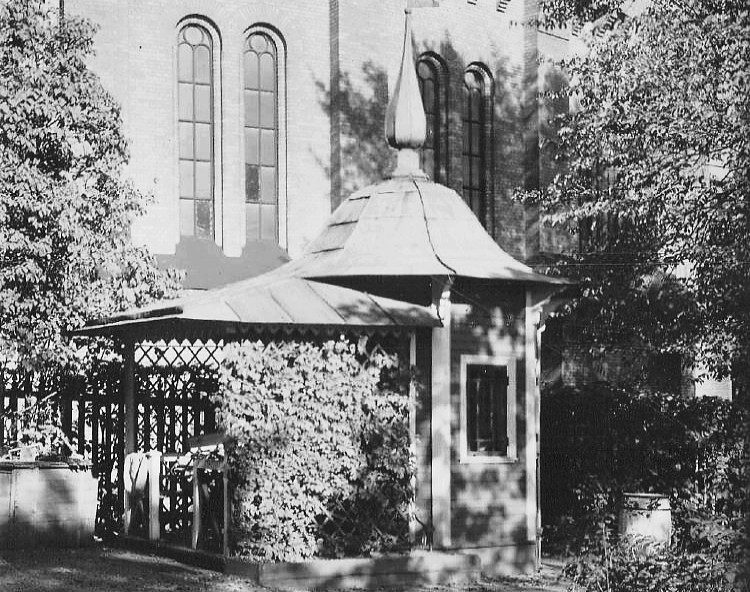 Lusthuset i Sinnernas trädgård på sin ursprungliga plats vid Klaragasverkets gasklocka i Sabbatsberg